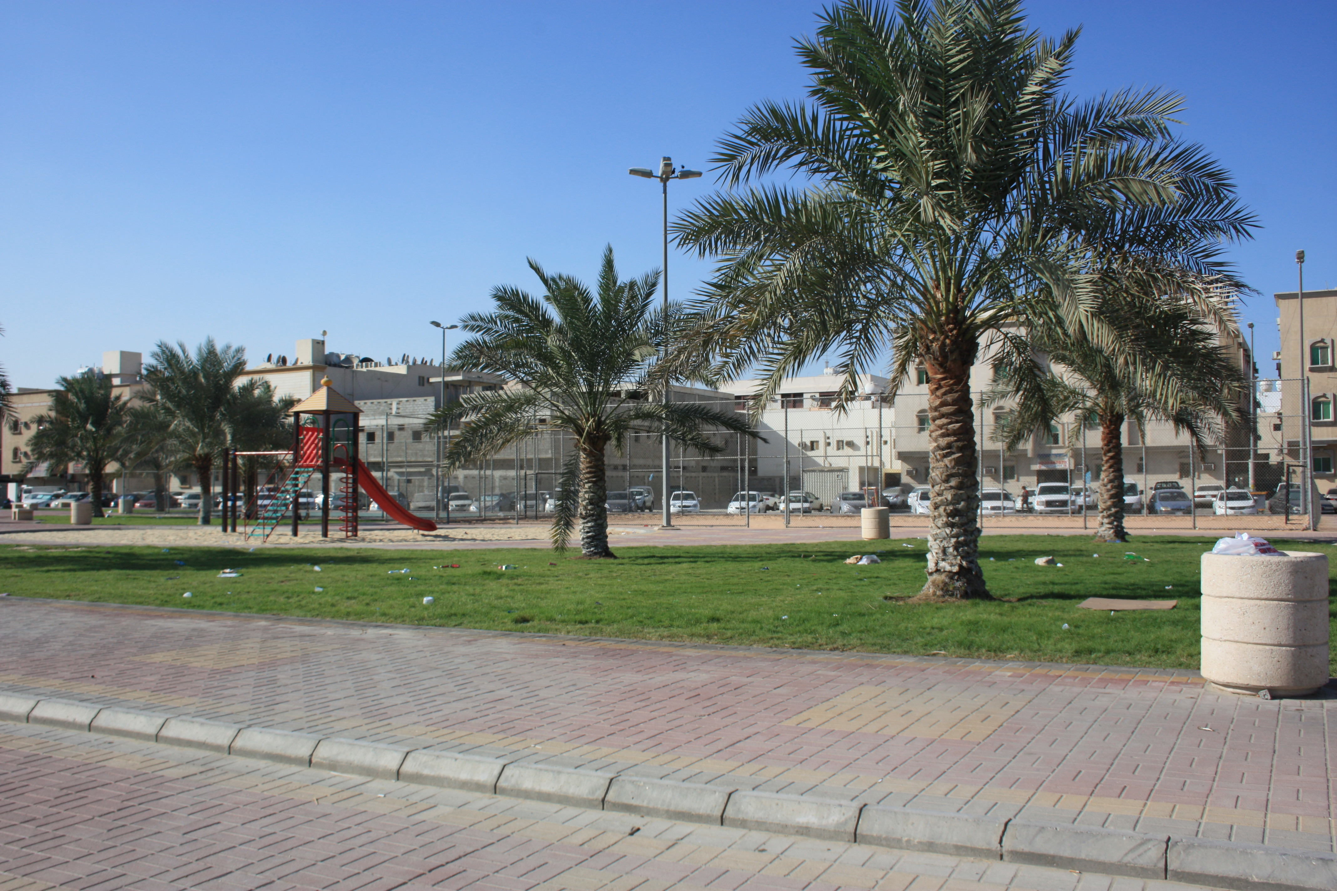 حديقة الأثير